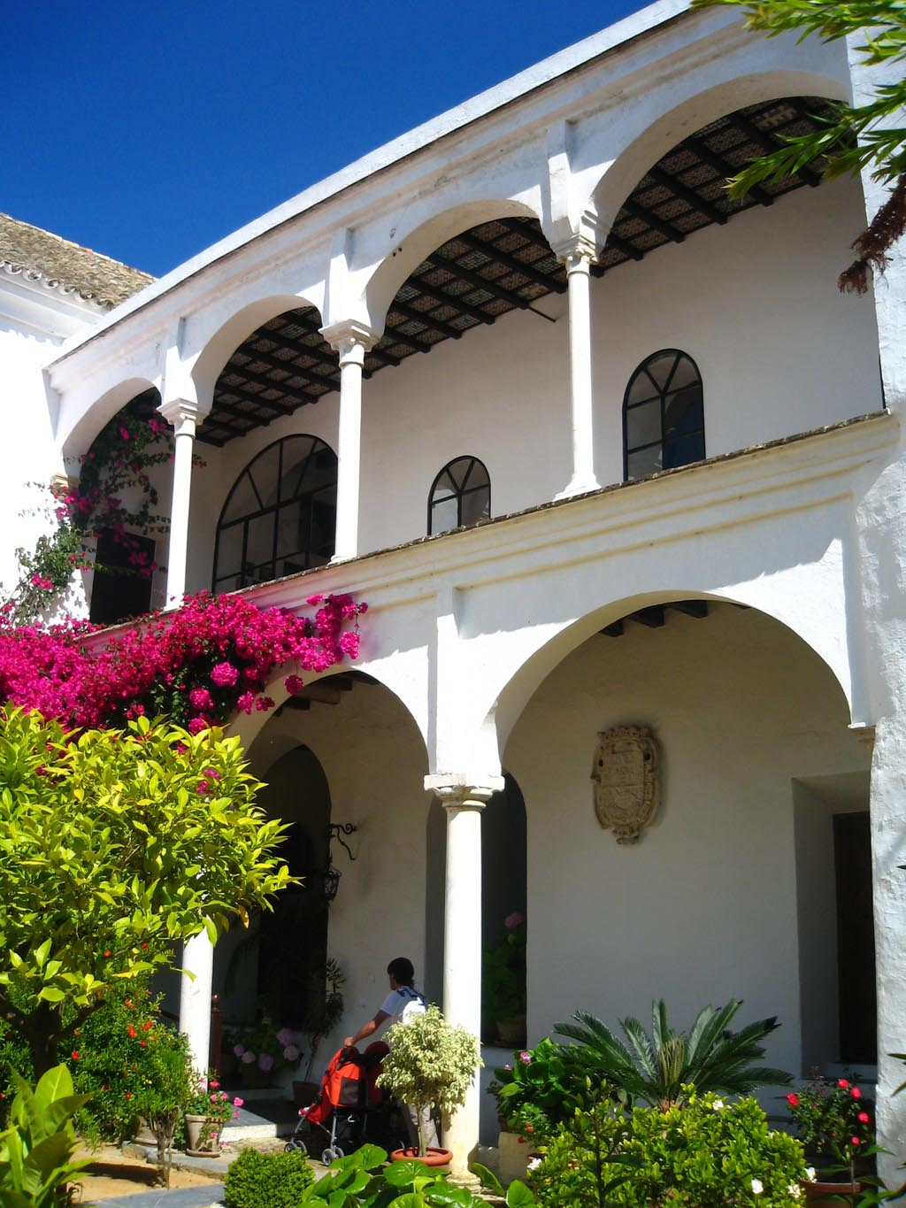 Fachada interior del Palacio Ducal de Medina-Sidonia, en Sanlúcar de Barrameda